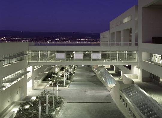 Università degli Studi di Messina, unime.it, Ripresa notturna della Facoltà di Ingegneria, Licenza Libera